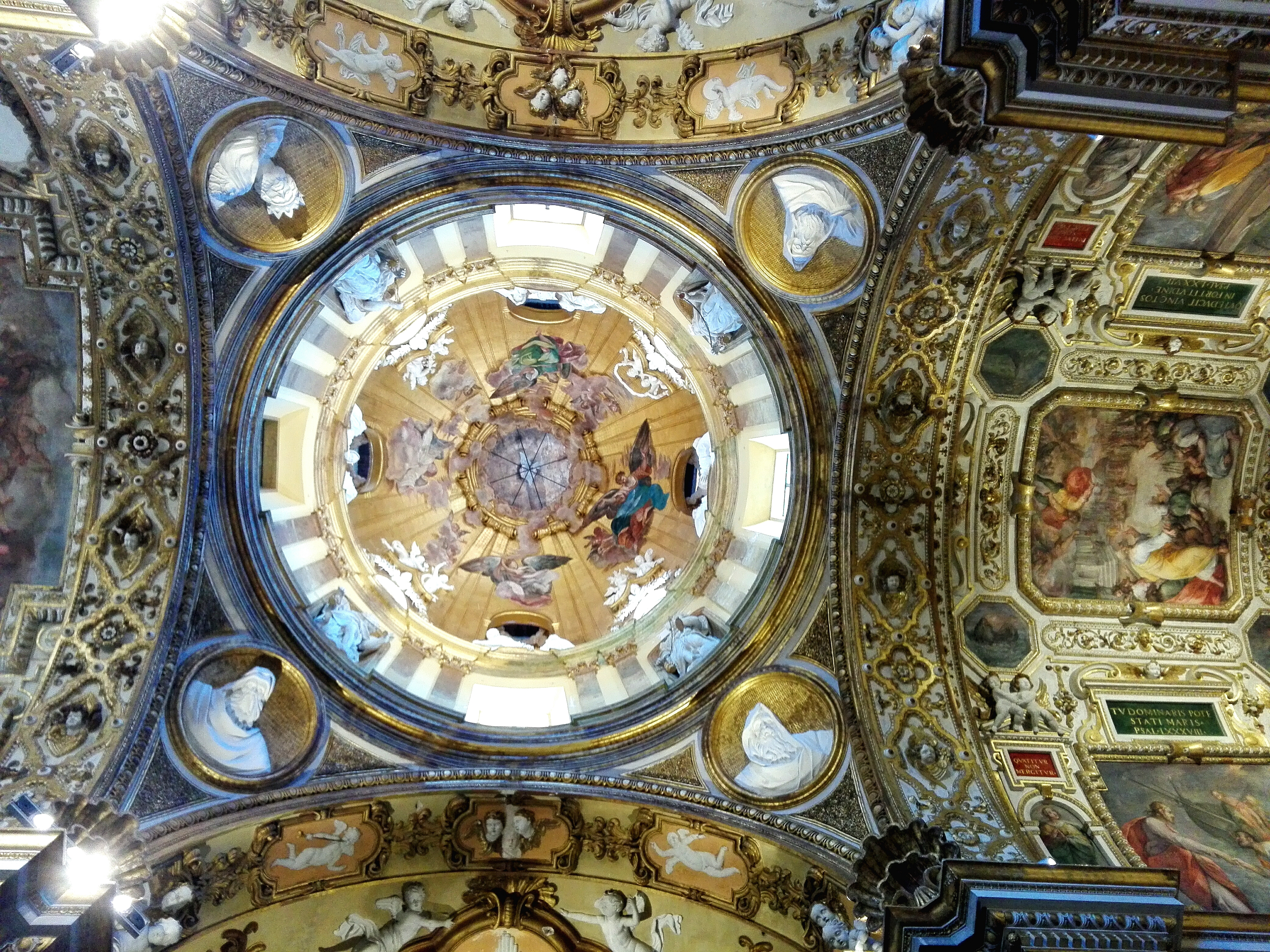 Chiesa